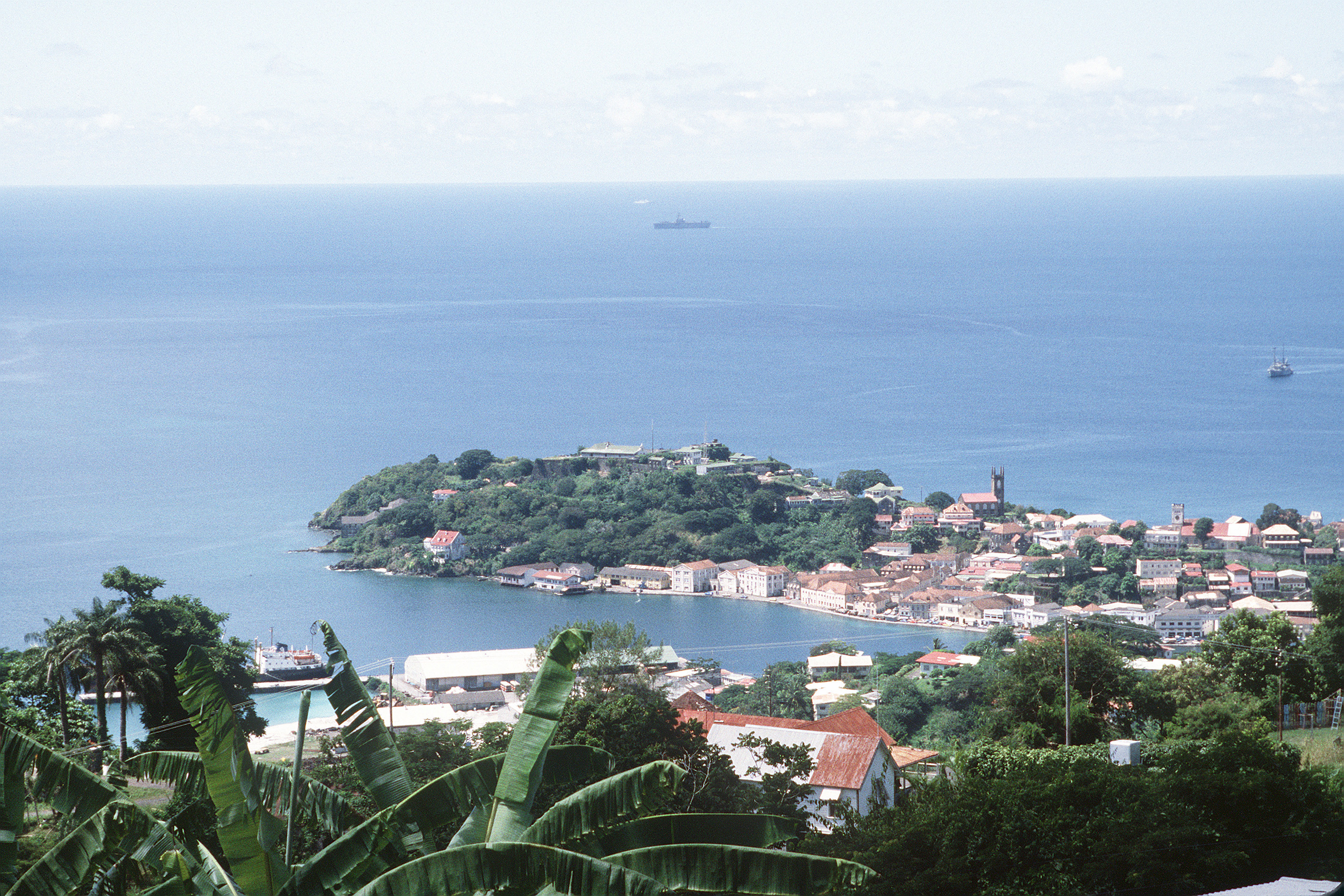 Die Hauptstadt Grenadas, Foto von 1983. Originaltext: A view overlooking St. Georges